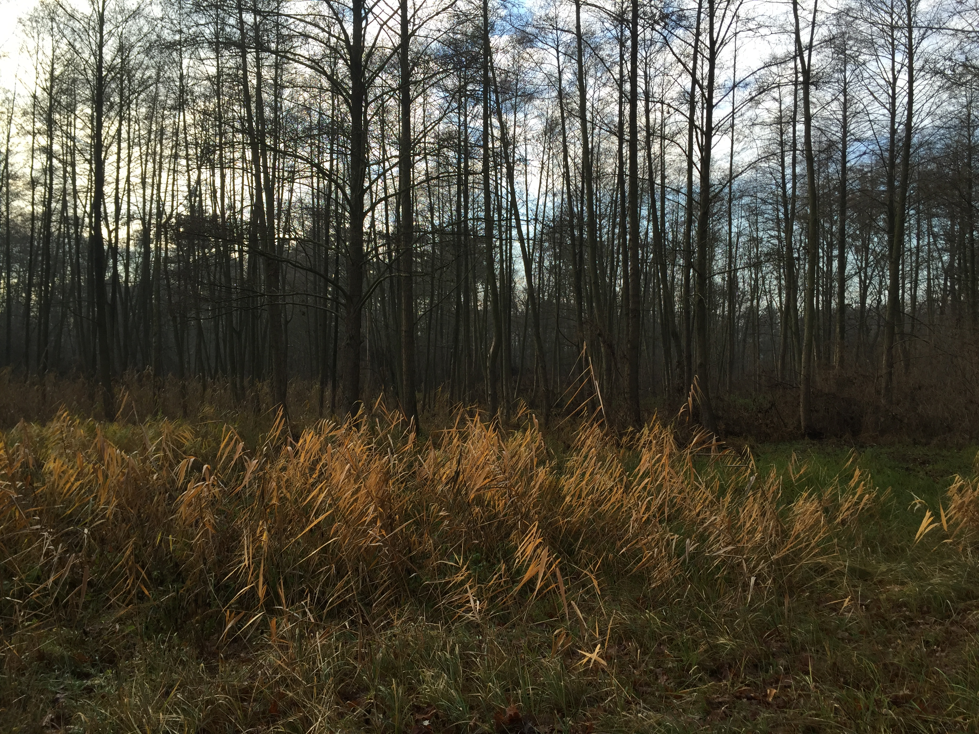 Olsze czarne bez liści pod koniec listopada w Zaniemyślu.